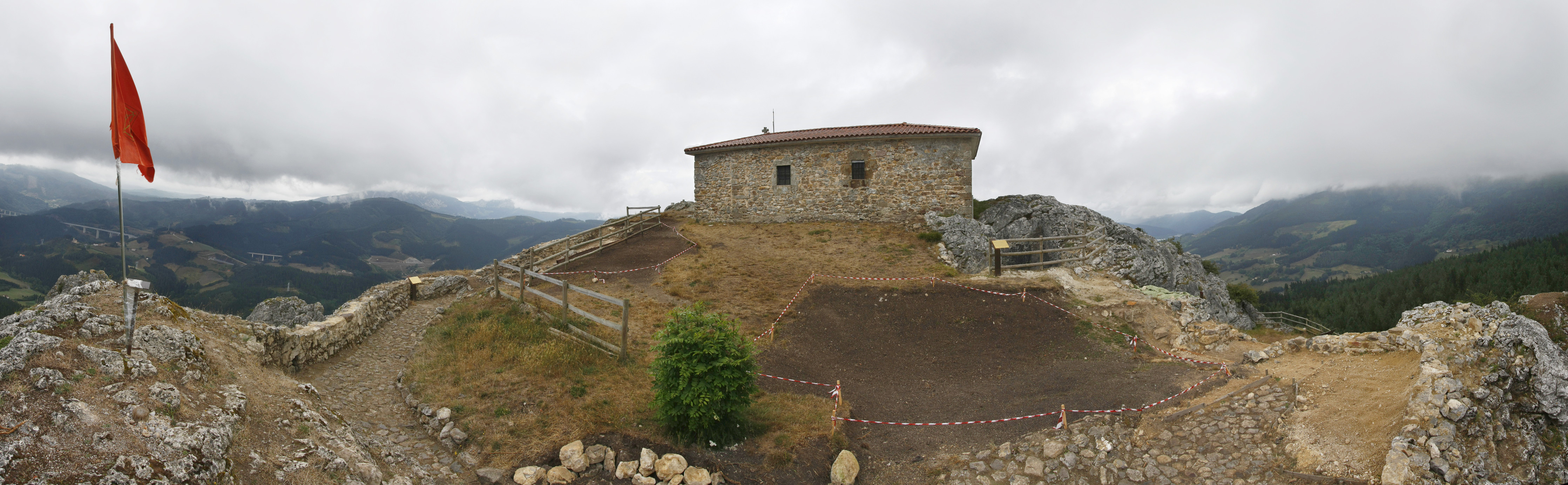 Aitzorrotz gaztelua. Hondakinak